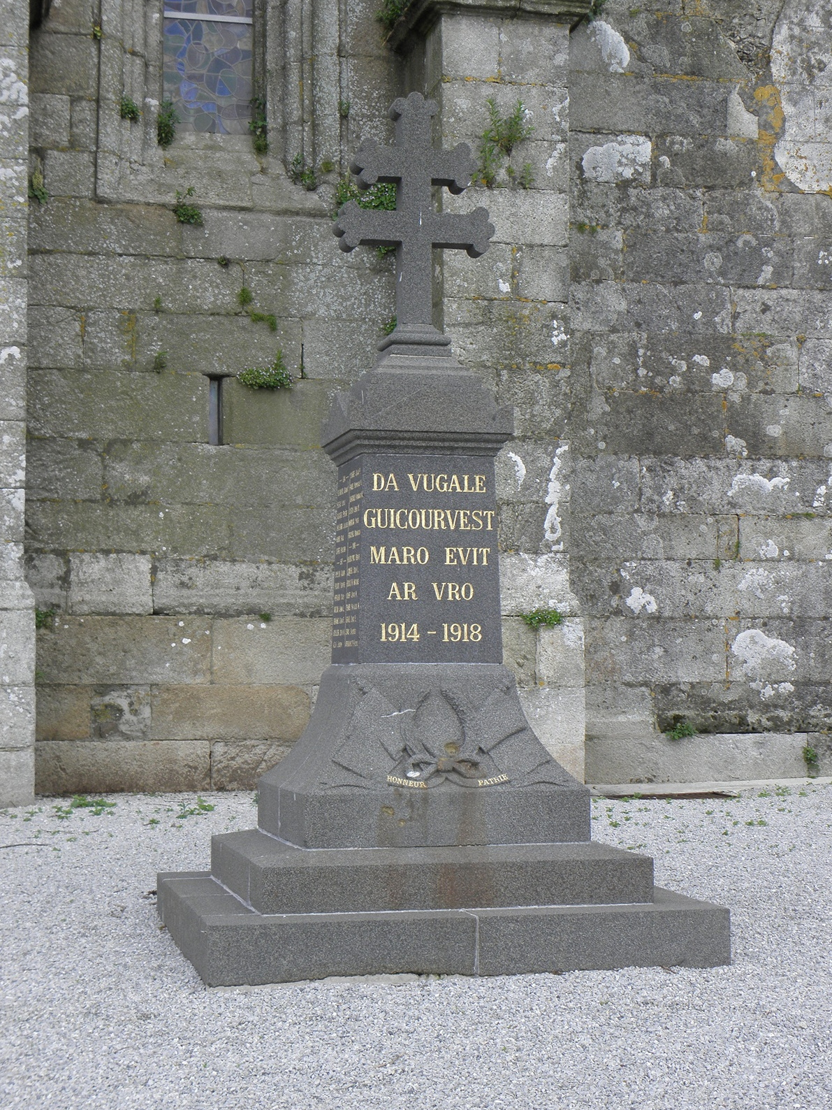 Monument aux morts de Plougourvest (29).